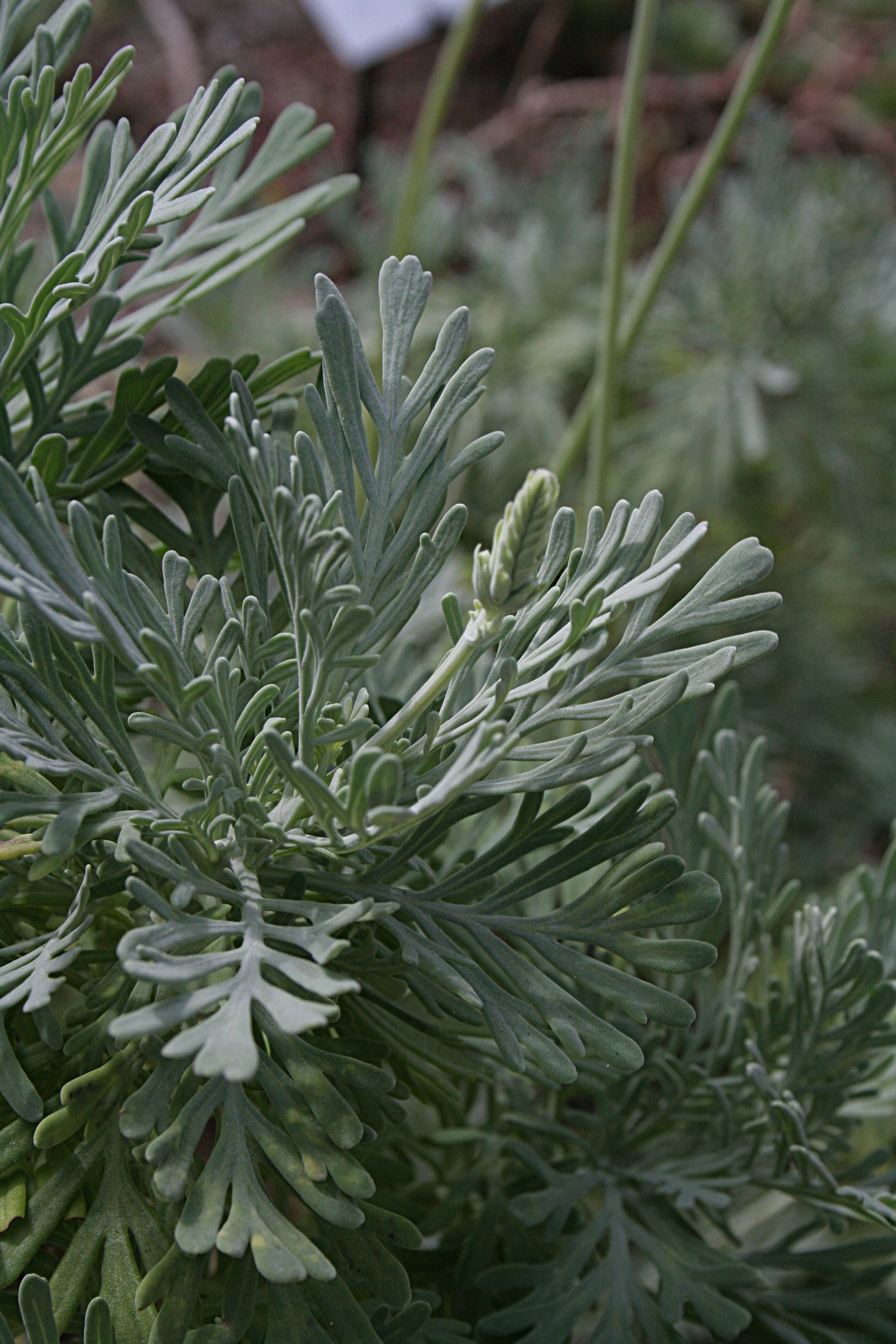 Lavandula pinnata Conservatoire botanique national de Brest, France, Juin 2007